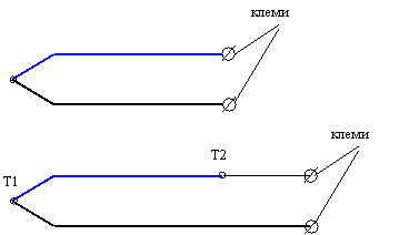 Термодвойка.